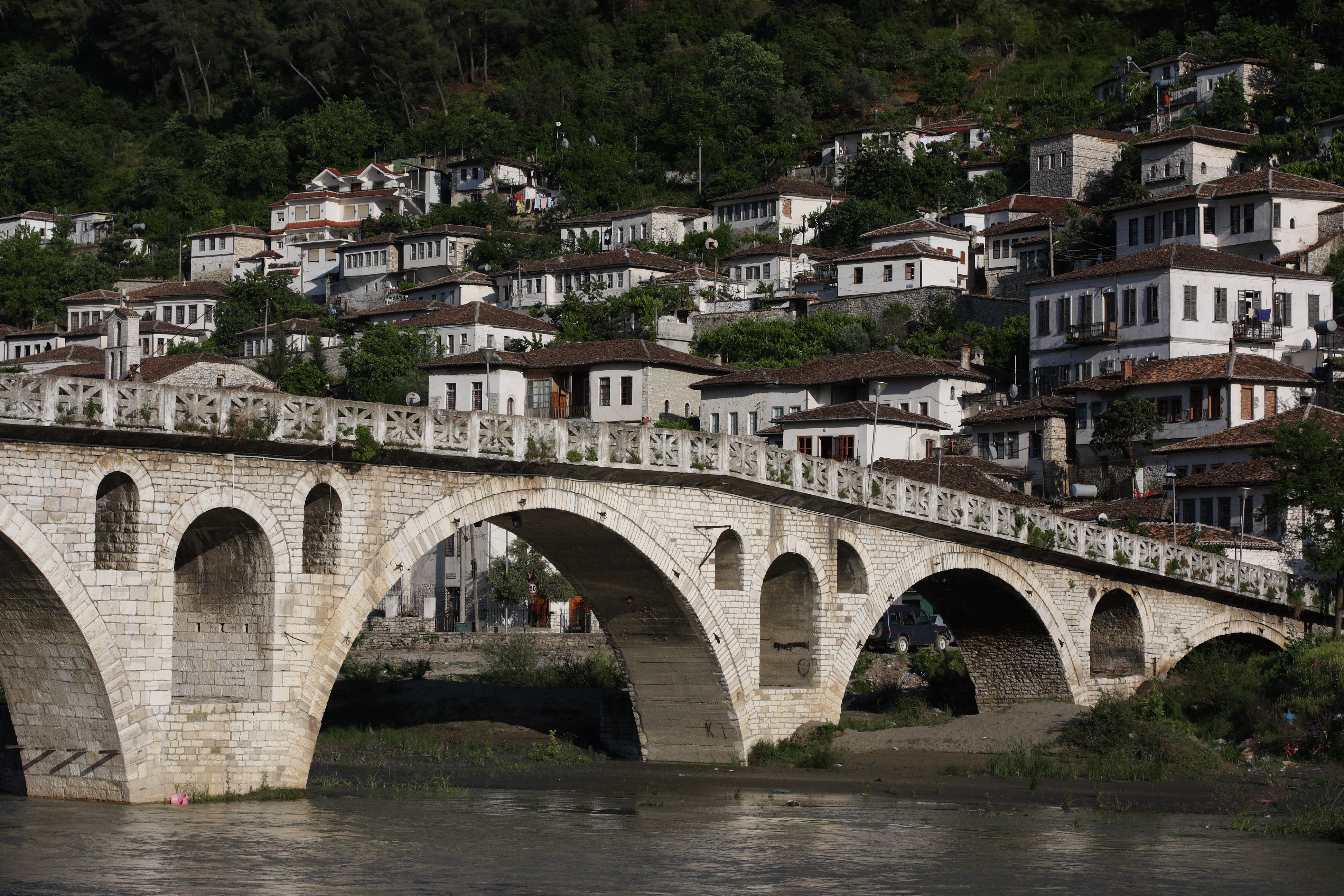 Berat, Albania